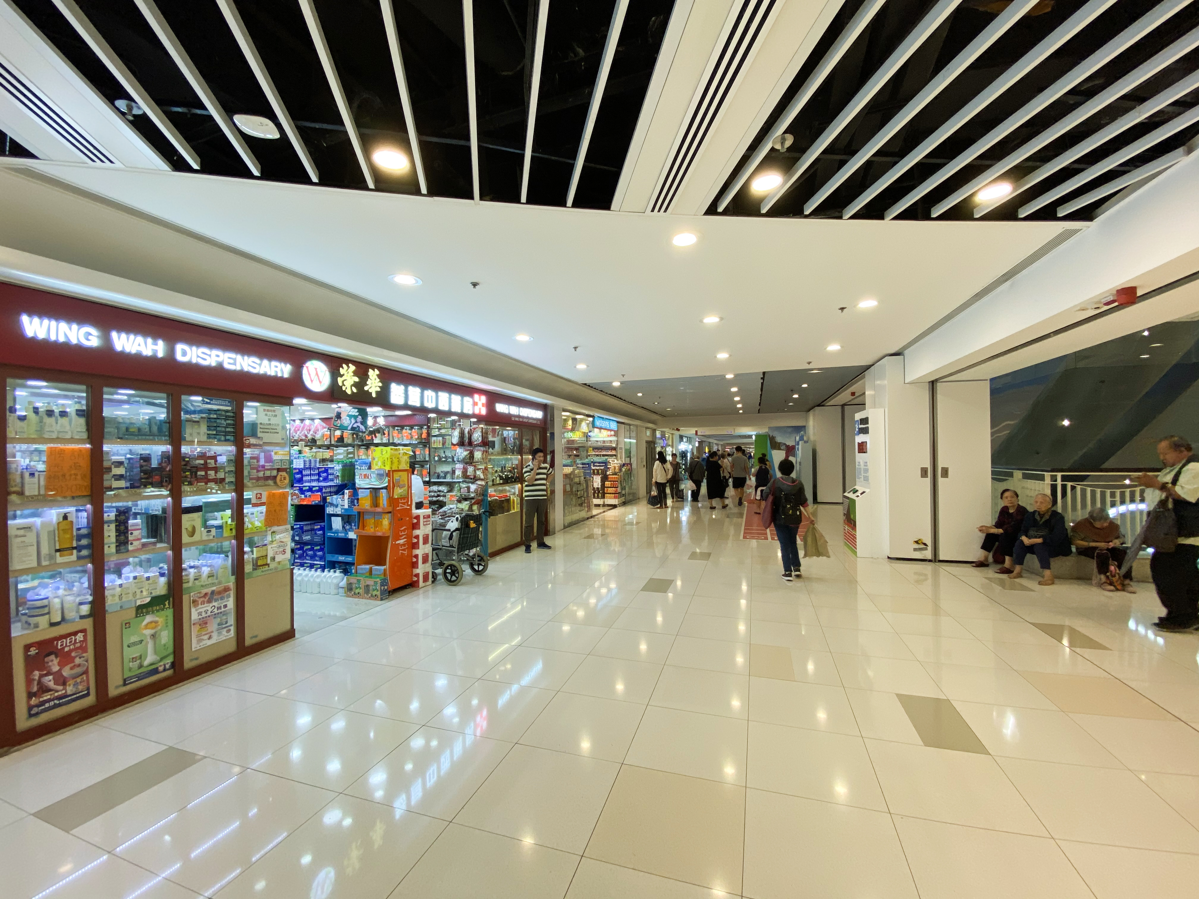 Sheung Tak Plaza Level 2